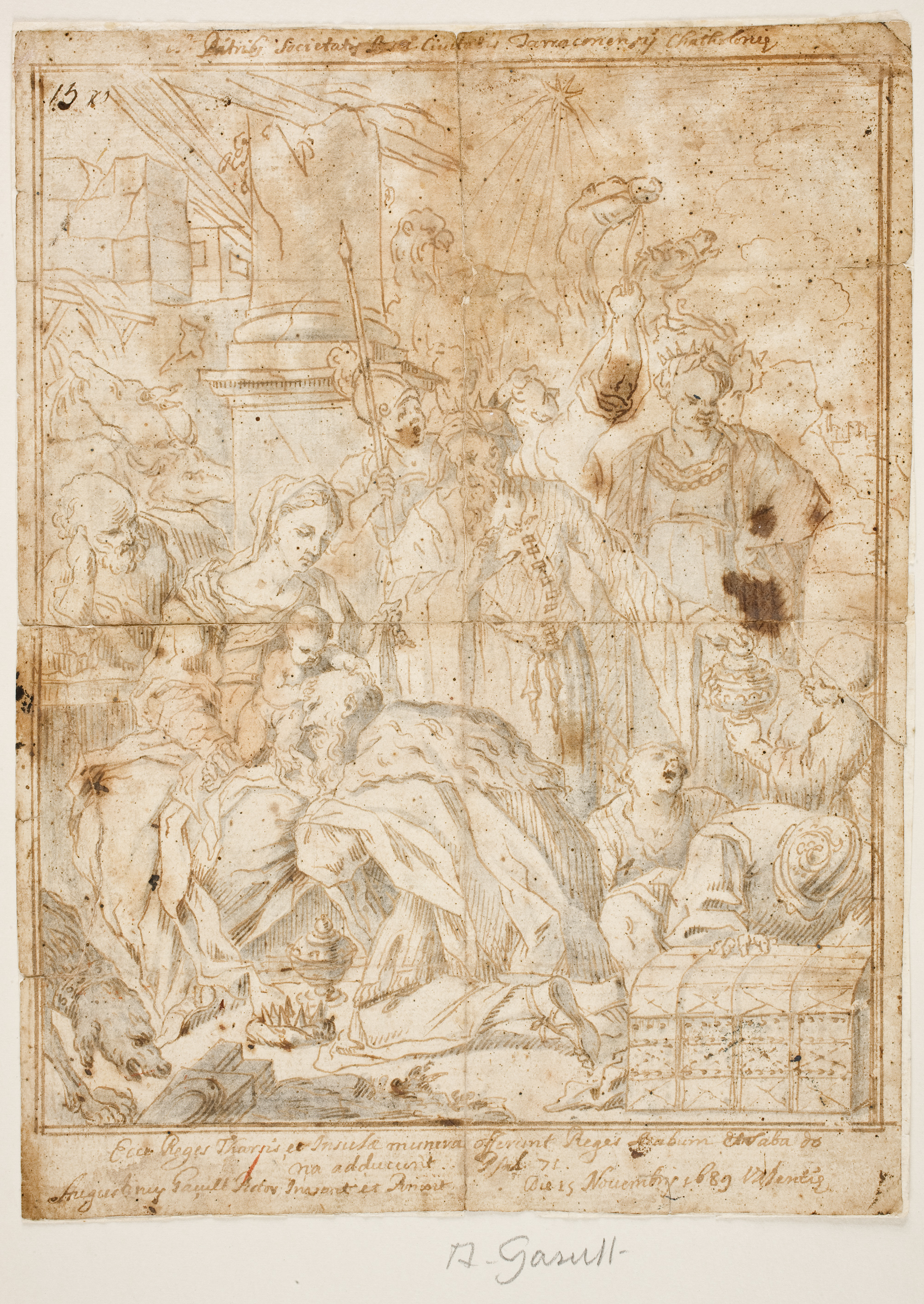 Adoración de los Reyes Magos, pluma y aguadas azulada y parda sobre papel, 252 x 190 mm, Madrid, Museo del Prado